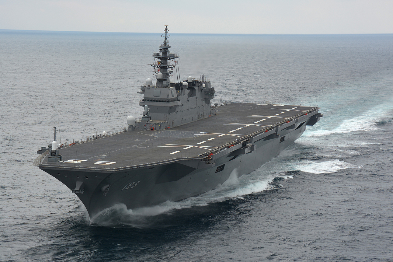 DDH-183 いずも